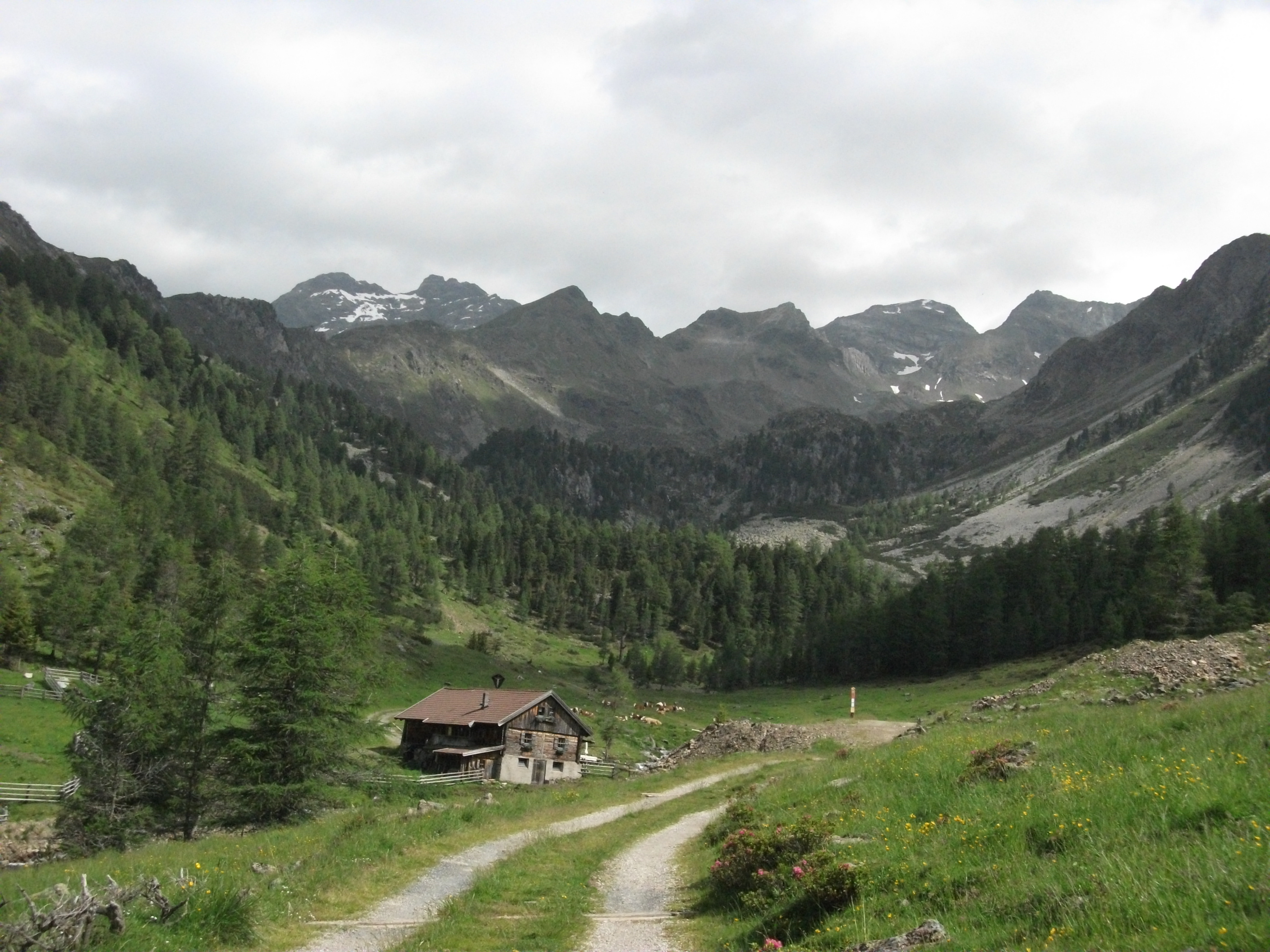 Haidacher Alm